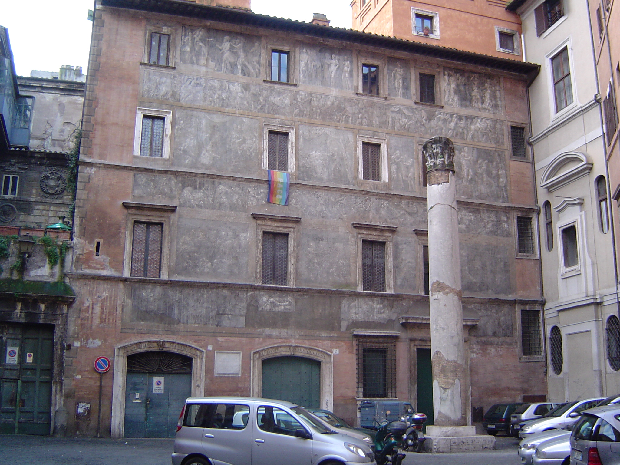 Piazza dei Massimi, Rome, Italy